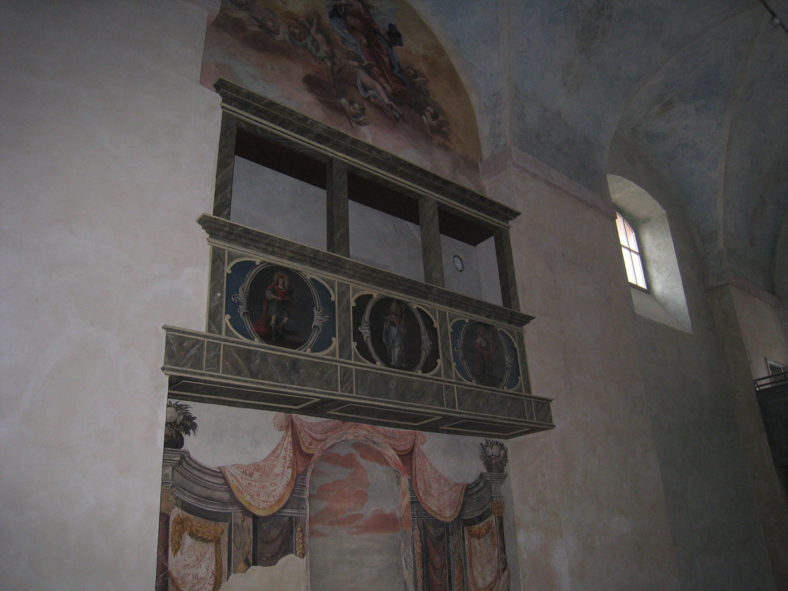 Pohled na dřevěnou oratoř v hlavní lodi kostela sv. Josefa v Chrudimi, nyní Muzea barokních soch, po provedení rekonstrukce v letech 2009-2010. Dle původního návrhu mělo dojít k jejímu deponování, což se naštěstí nestalo.